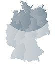 Norddeutschland Northern Germany